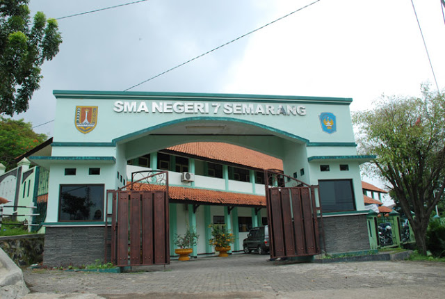 Megahnya gerbang SMA Negeri 7 Semarang.